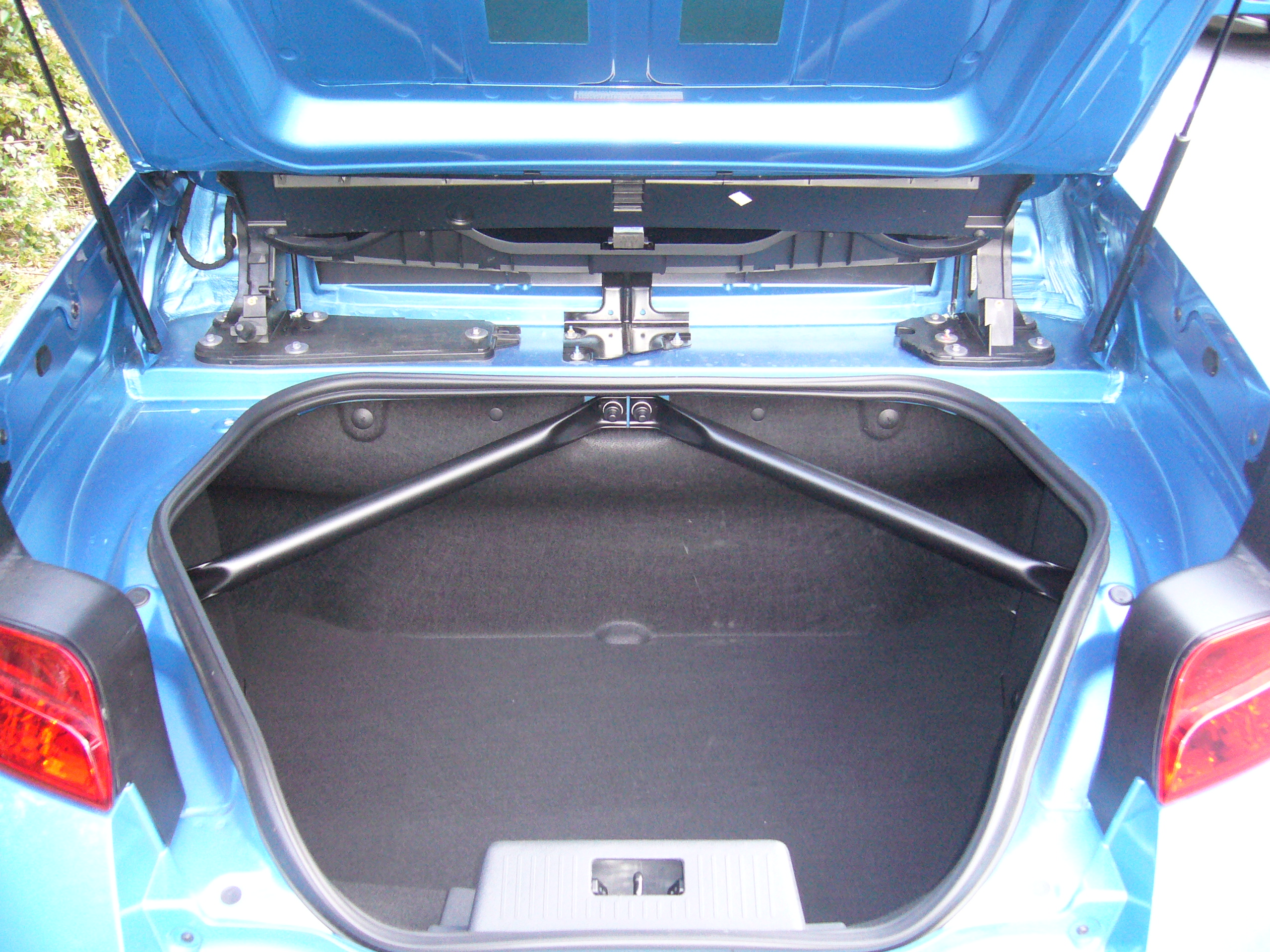 ルノー・ウインド